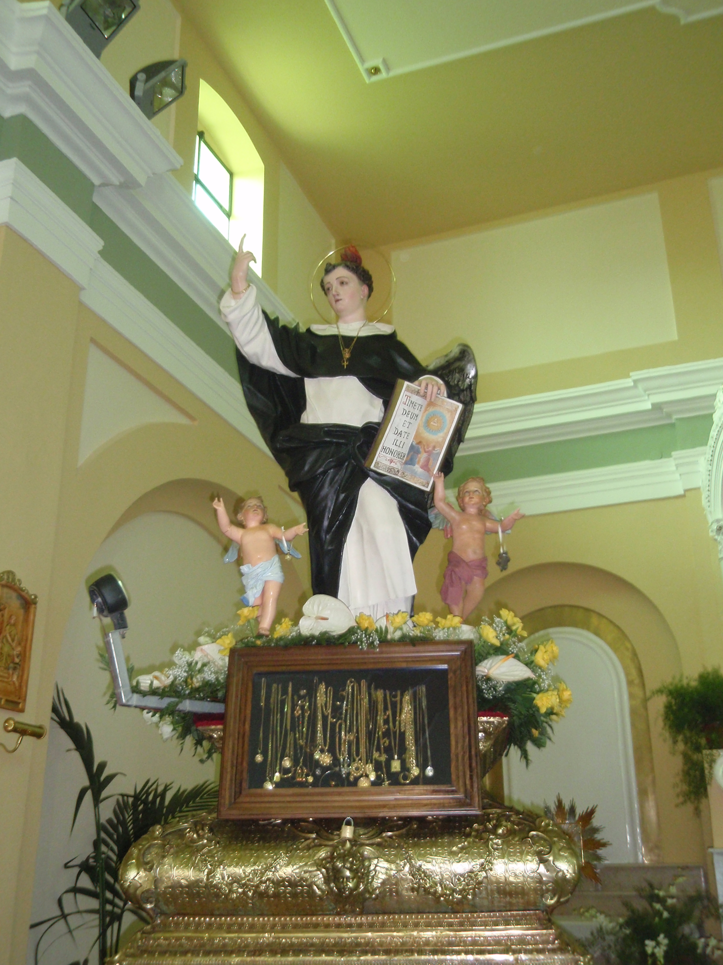 Messignadi, frazione di Oppido Mamertina; la statua di San Vincenzo Ferreri conservata nella chiesa parrocchiale di San Nicola.